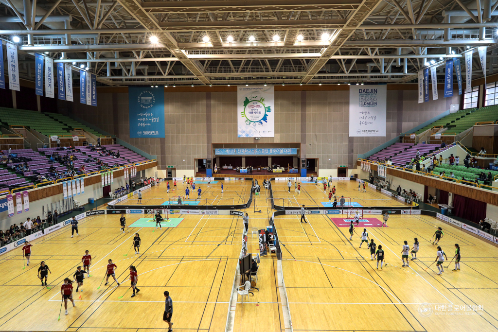 플로어볼 경기장-4개면 설치 사진(대진대학교)